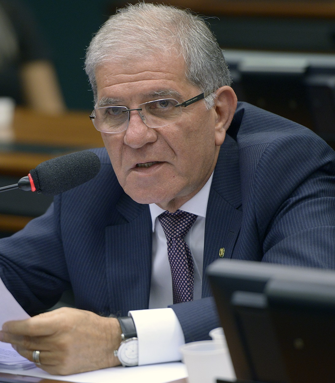 Chico d'Ângelo em outubro de 2016.